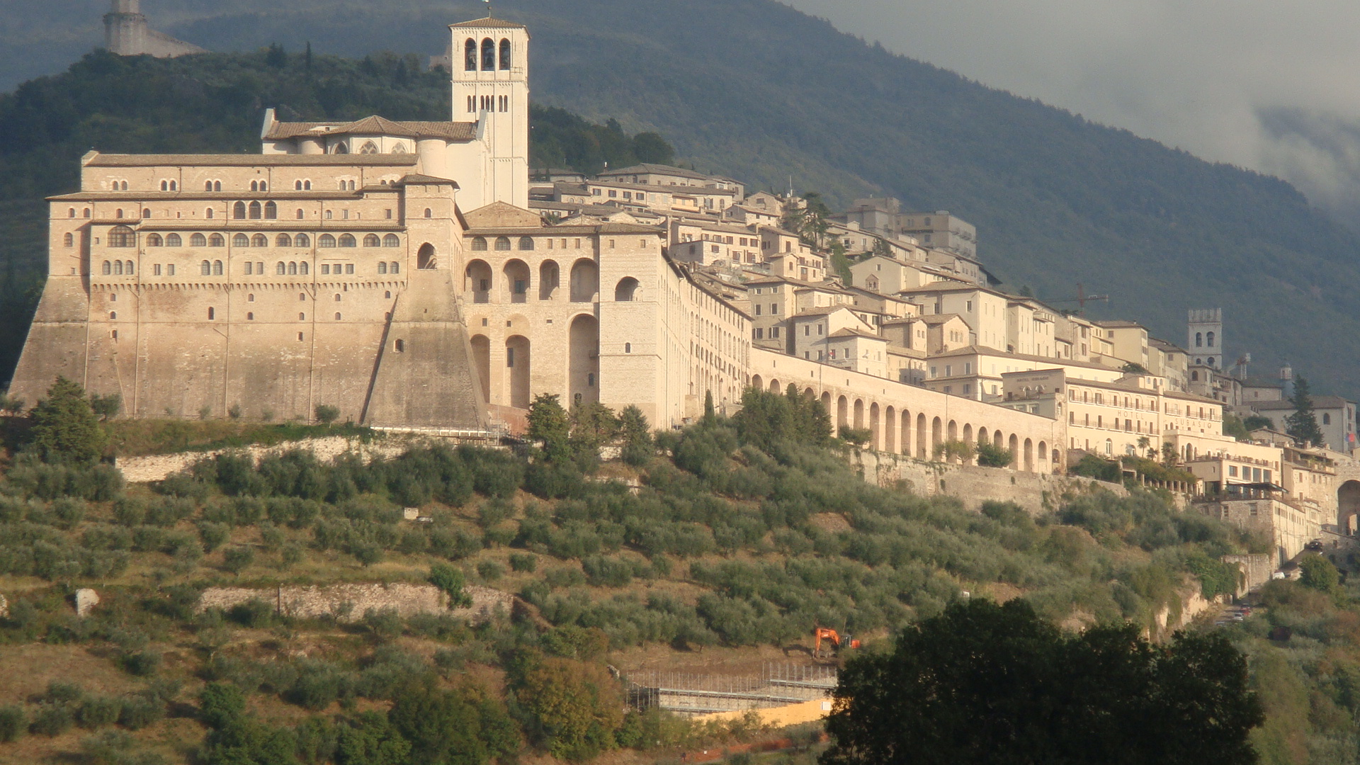 SCORCI DELLA CITTA'